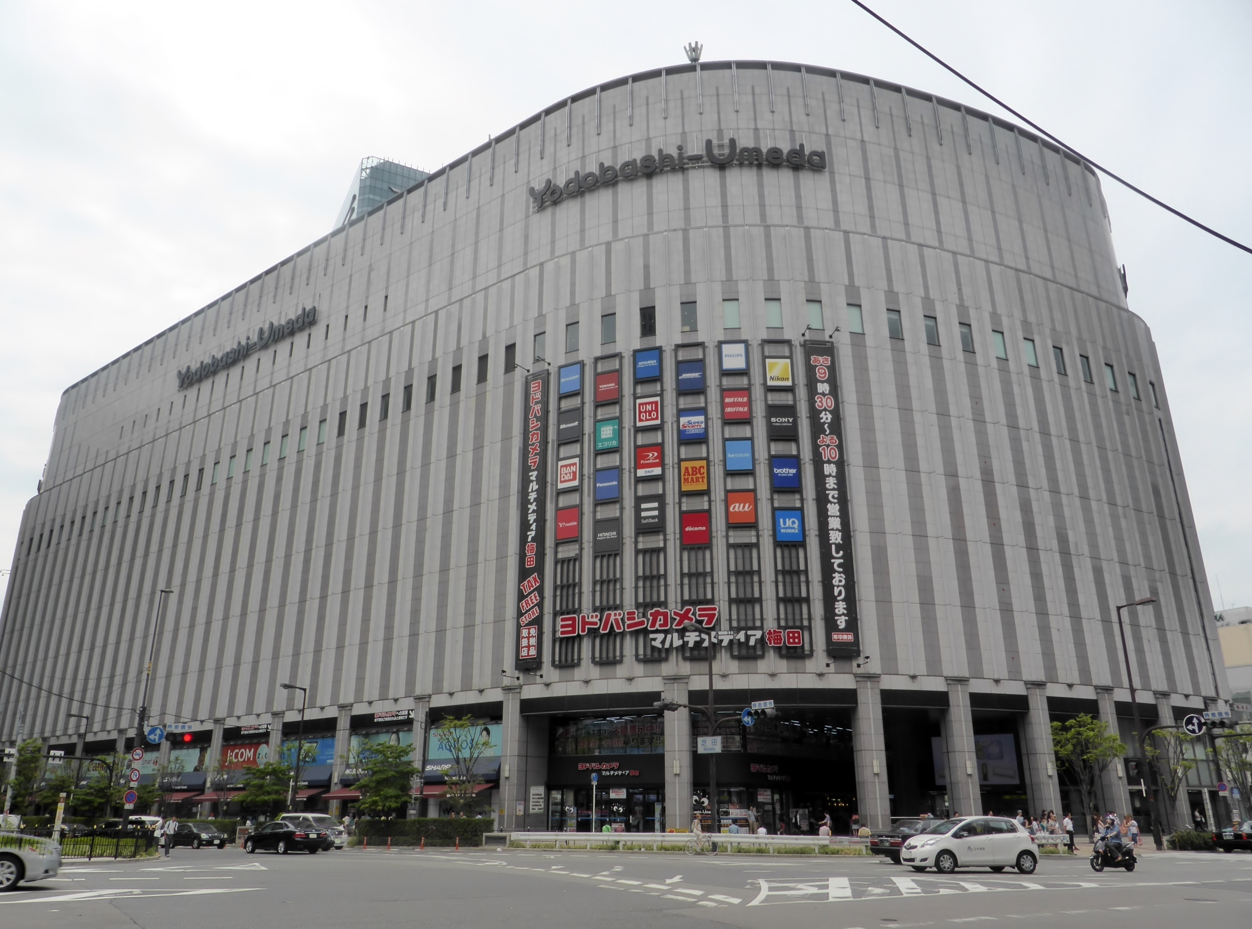 2014年8月1日時点のヨドバシ梅田を撮影。